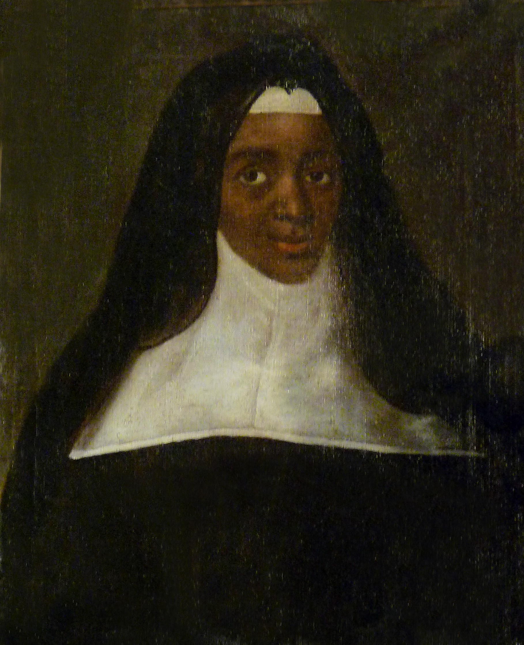 Remiremont, Musée Charles Friry : La Mauresse de Moret, école française, XVIIe siècle. Ce portrait a été donné par Madame de Marey à Madame de Champenois, tante de Charles Friry, toutes deux habitant Saint-Mihiel. Il est ensuite entré dans la collection de Charles Friry.